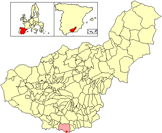 Situación de la localidad de La Chucha (en el municipio de Motril) respecto a la provincia de Granada, en España.